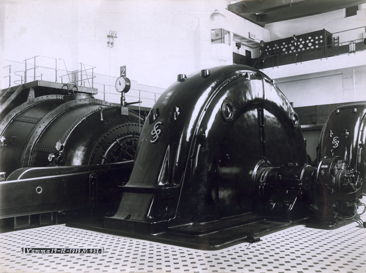 Vamma kraftstasjon (AS Hafslund). Interiør. Maskinsal. Elektrisitetsdirektoratet. Dato: 19.12.1919